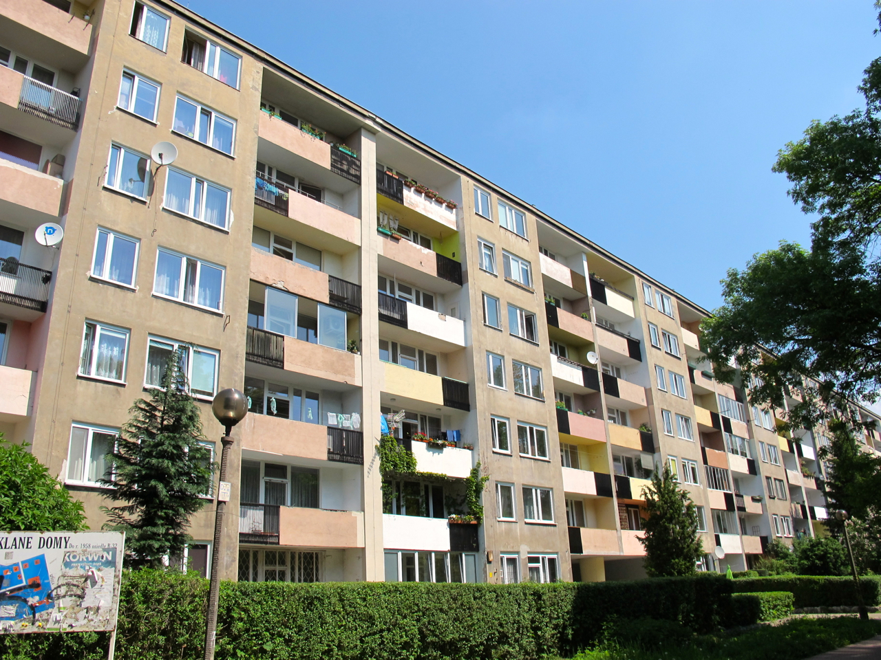 Blok Szwedzki in Nowa Huta in Krakow